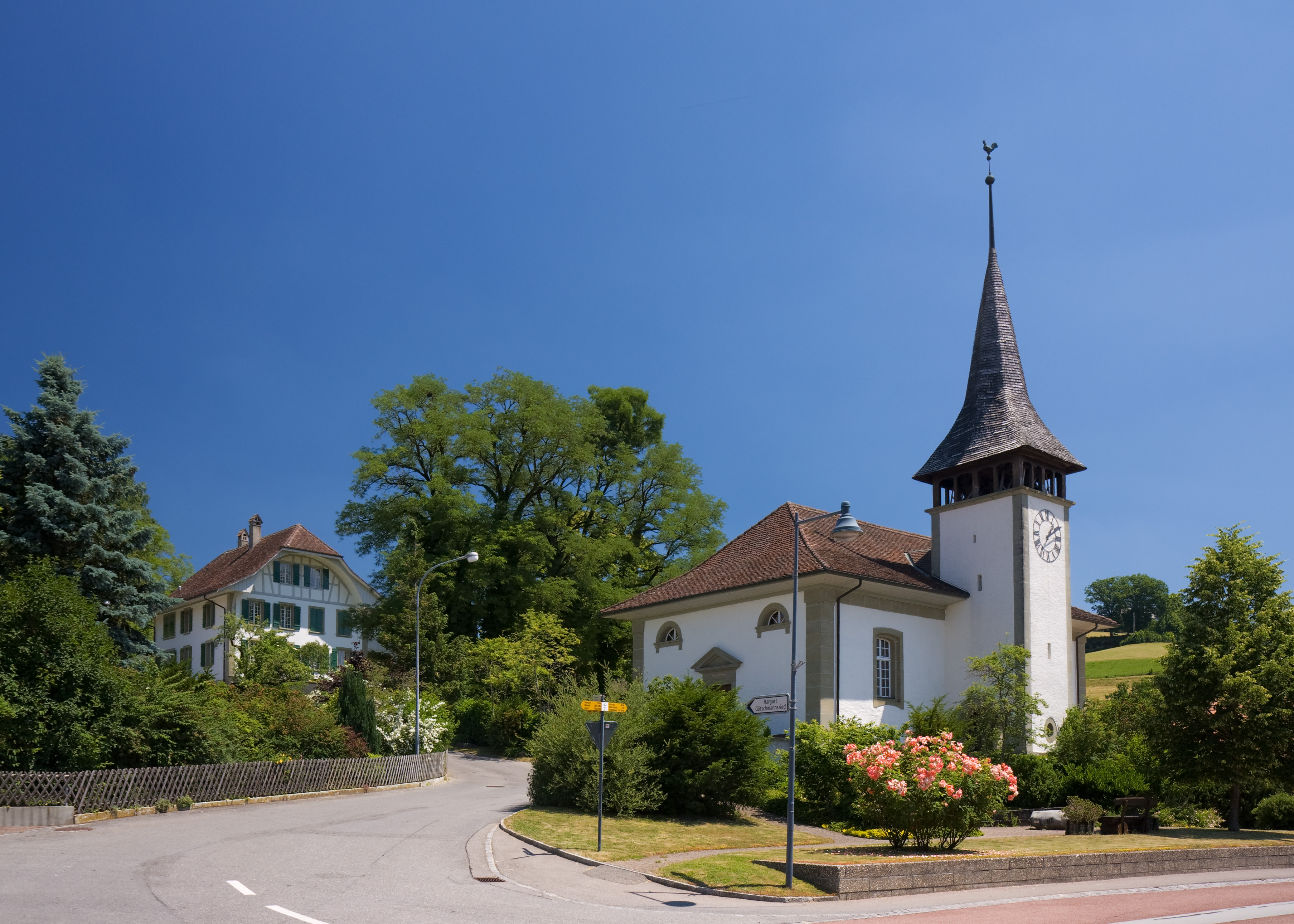 Dorfzentrum mit Kirche von Albligen, Schweiz. Mitarbeit von Johann Daniel Osterrieth (* 9. Oktober 1768 in Straßburg, Elsass; † 25. Juli 1839 in Bern) war ein Architekt des Klassizismus. Er war Berner Stadtbaumeister.